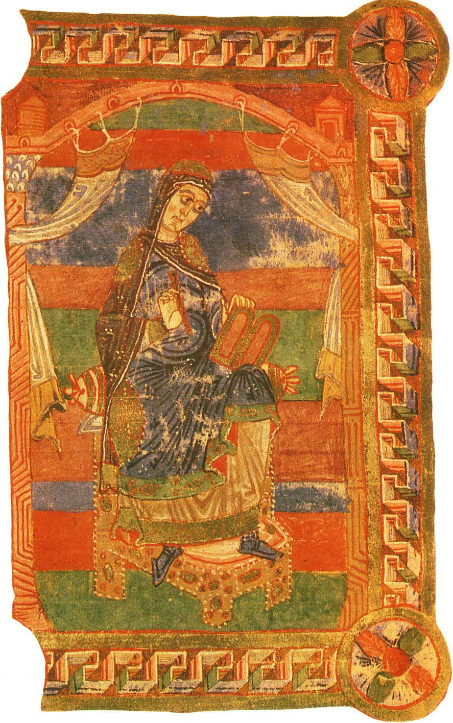 Sainte Radegonde. Vie de sainte Radegonde, XIème siècle. Bibliothèque municipale de Poitiers.